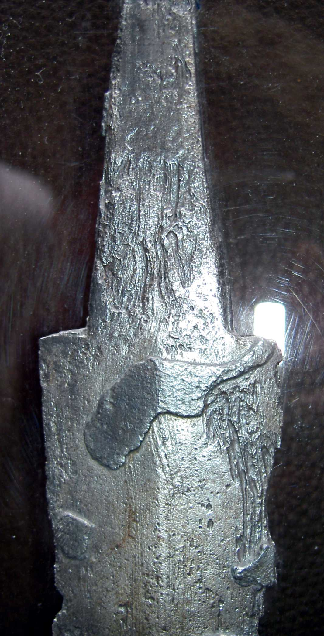 Ein als keltisch zu bezeichnendes Schwert (es wurde zusammen mit zwei eindeutig keltischen Lanzen gefunden) mit erkennbaren Damaststrukturen.